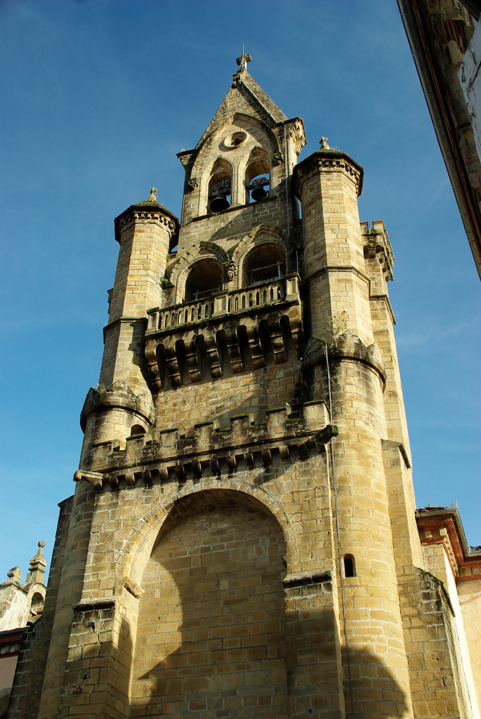 Église Saint-Étienne de Seix (Ariège, France) : le clocher du XVIe siècle, de pierre jaune, est une haute muraille percée au sommet de deux rangées d’arcades supportant les cloches. Un avant-corps, ouvert par une arcade cintrée en forme de mâchicoulis, supporte une courtine dont les merlons ont disparu. Une tourelle ronde à droite contient l’escalier qui prend directement sur la rue. .